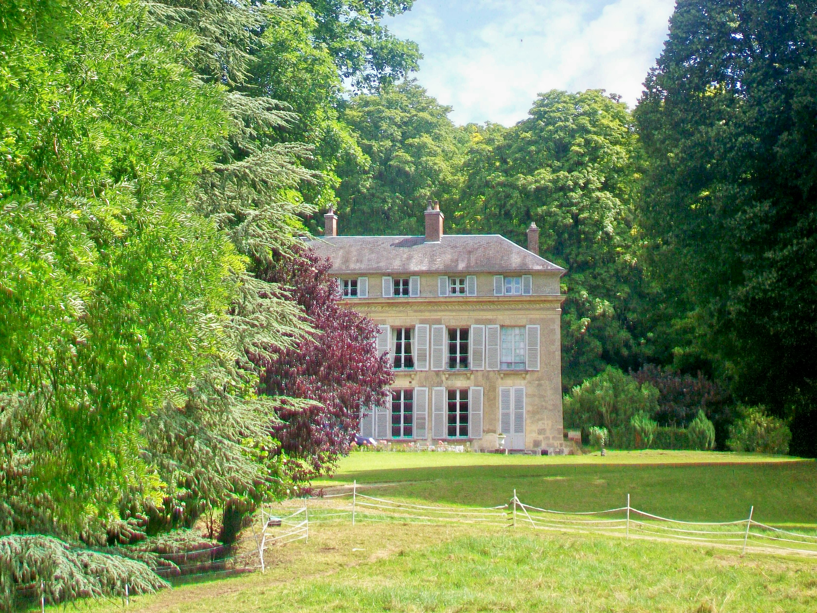 Vue partielle du château des Boves, façade sud-ouest vers la vallée de l'Aubette.